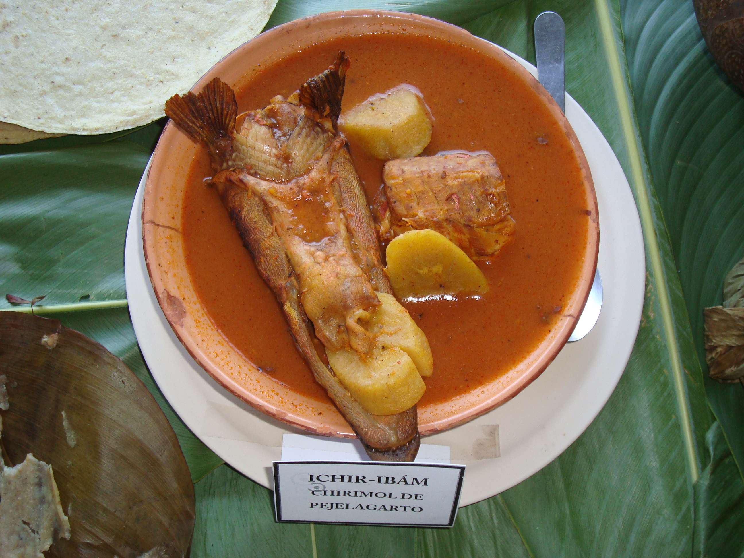 Pejelagarto en chirmol, uno de los platillos típicos de la gastronomía del estado de Tabasco, México.